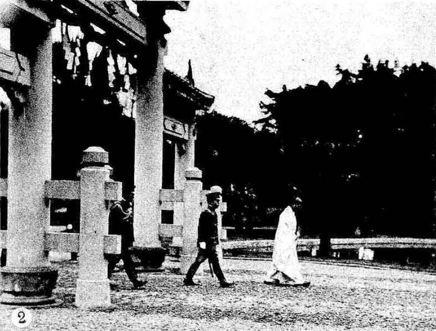 中文（台灣）: 昌德公李王垠在1935年1月造訪臺灣時參拜建國神社之景象。